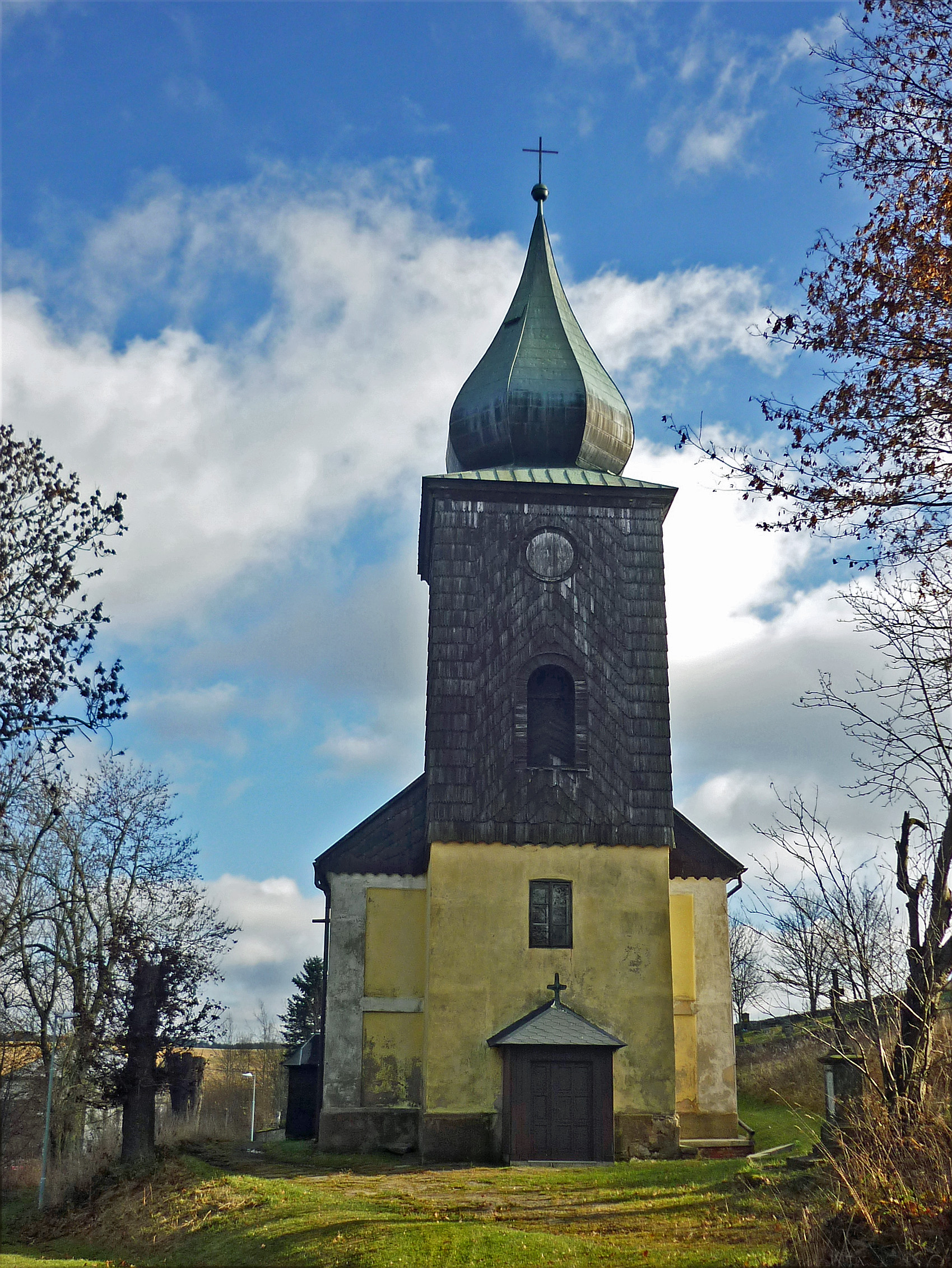 Pfarrkirche Mariä Heimsuchung in Moldau/Moldava im Erzgebirge